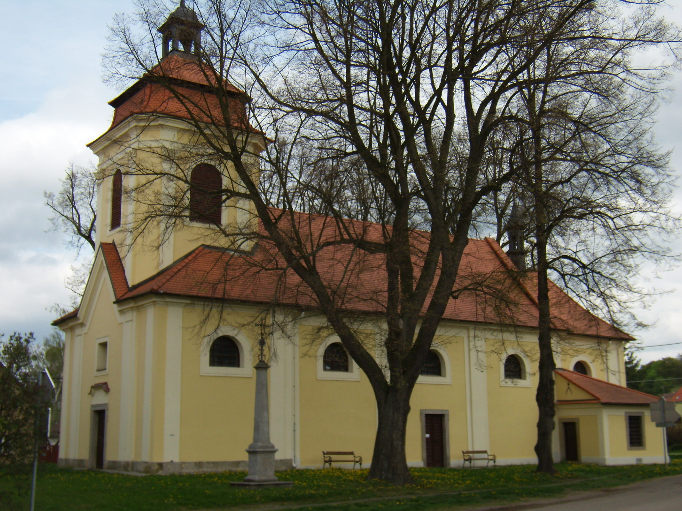 Dnešice - kostel sv. Václava